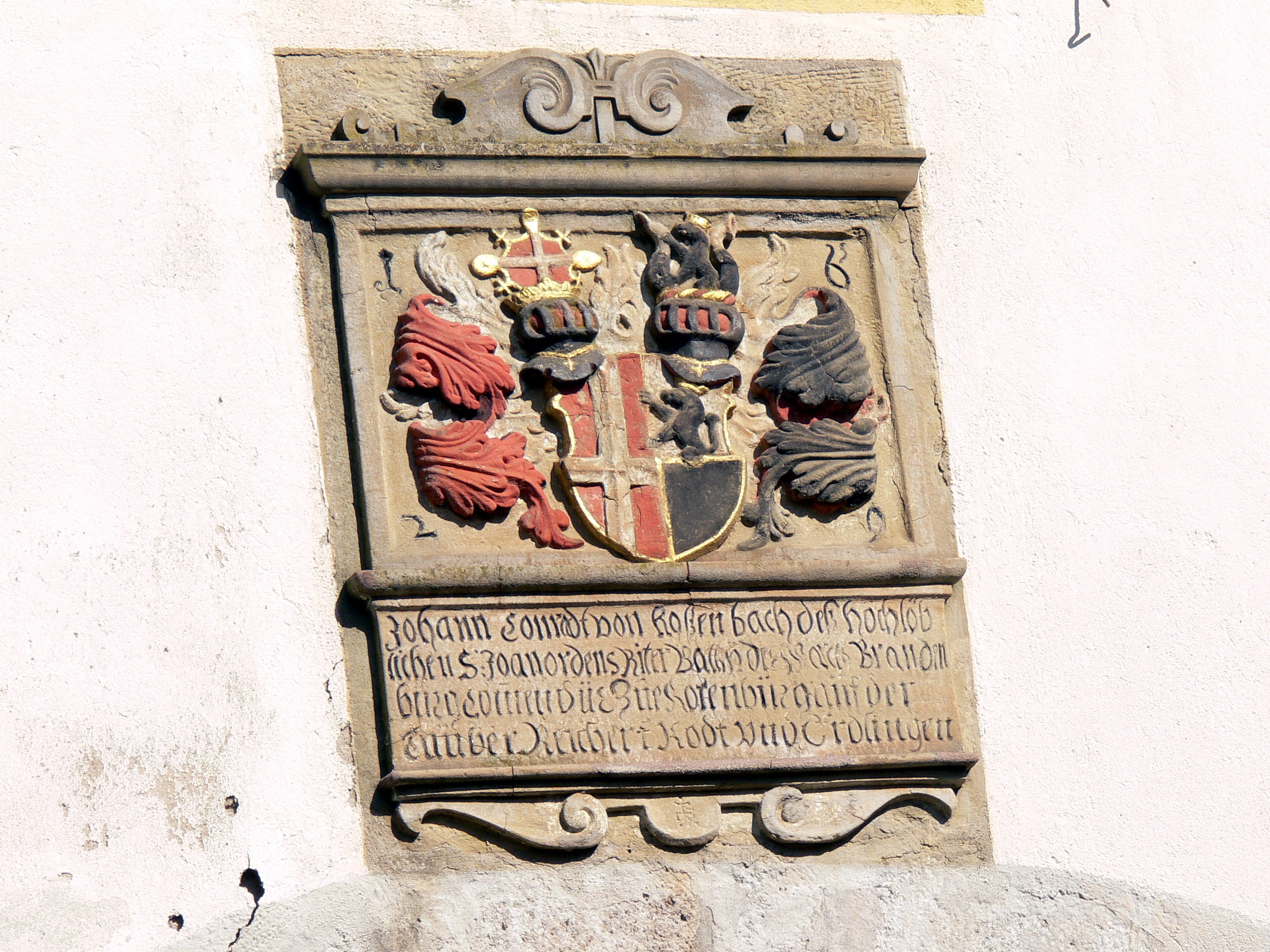 Rothenburg ob der Tauber: Kriminalmuseum Rothenburg: Hofwärtige Seite. Wappen von Johann Conrad von Rosenbach, Komtur des Johanniter-Ordens zu Rothenburg in der Ballei Brandenburg 1629. Das Portal selbst trägt die Zahl 1593. Zu beachten ist auch das schöne Renaissance-Steinmetzzeichen am unteren Rand rechts der Mitte. Das zusammengesetzte Wappen (Johanniter Orden und von Rosenbach) ist gespalten: Heraldisch rechts: Wappen des Johanniter-Ordens, hier nicht als typisches Johanniterkreuz dargestellt, sondern in Rot ein silbernes durchgehendes Kreuz. Helmzier ein Schirmbrett mit goldenen Zierelementen. Heraldisch links: Wappen von Rosenbach, silbern-schwarz geteilt, oben aus der Teilung hervorkommend ein schwarzer Löwe, golden gekrönt, rot gezungt. Helmzier der wie im Schild bez. Löwe zwischen zwei silbern-schwarz geteilten Büffelhörnern. Die Helmdecken sind schwarz-silbern.